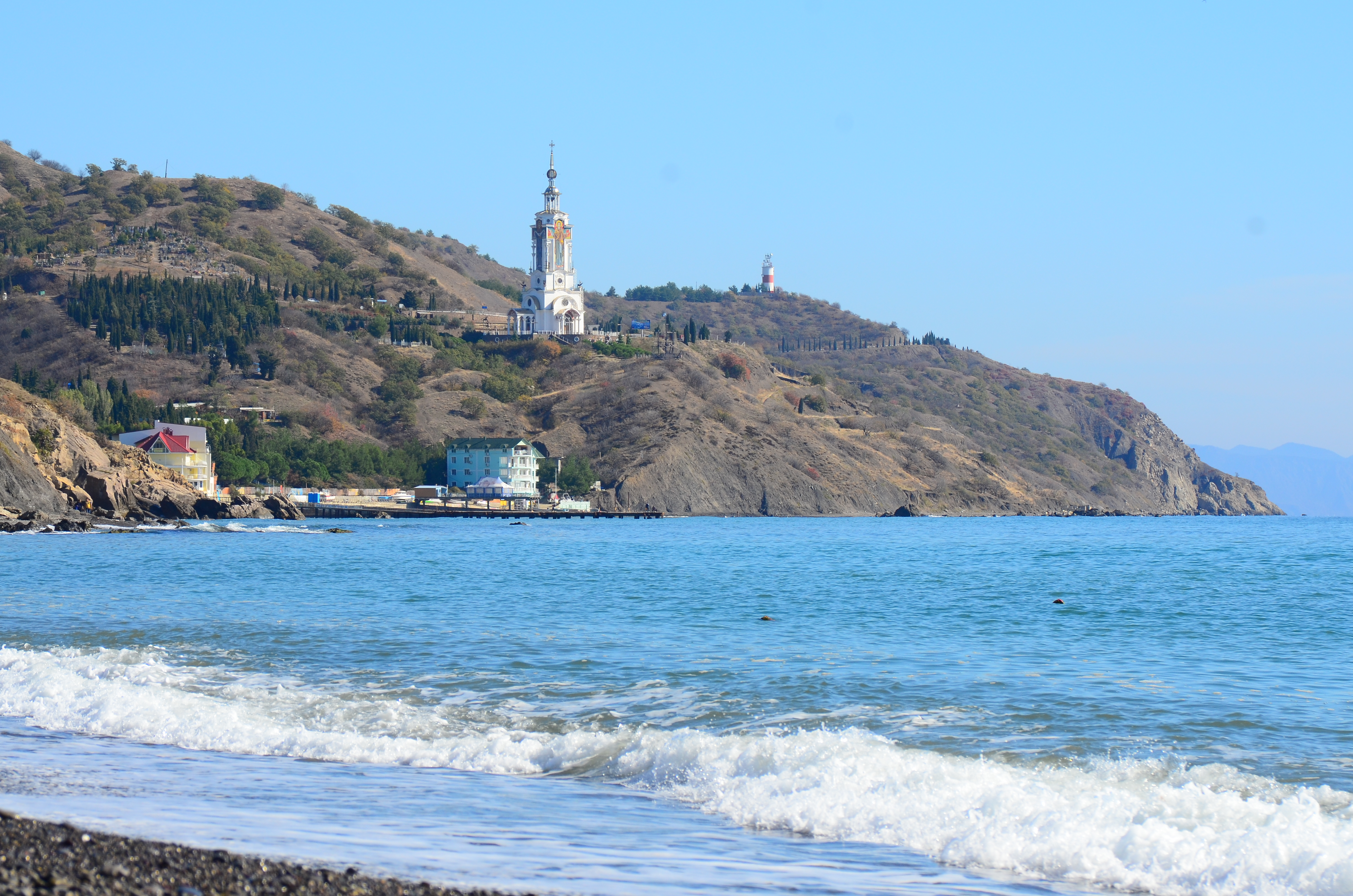 Крым.